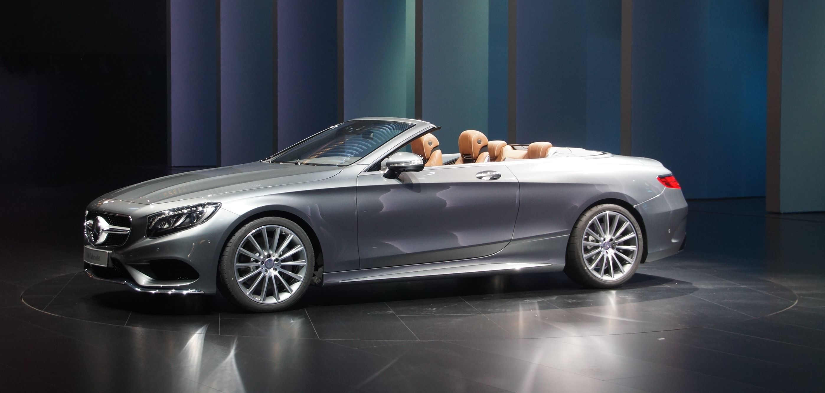 Mercedes-Benz S 500 bei der IAA 2015 in Frankfurt